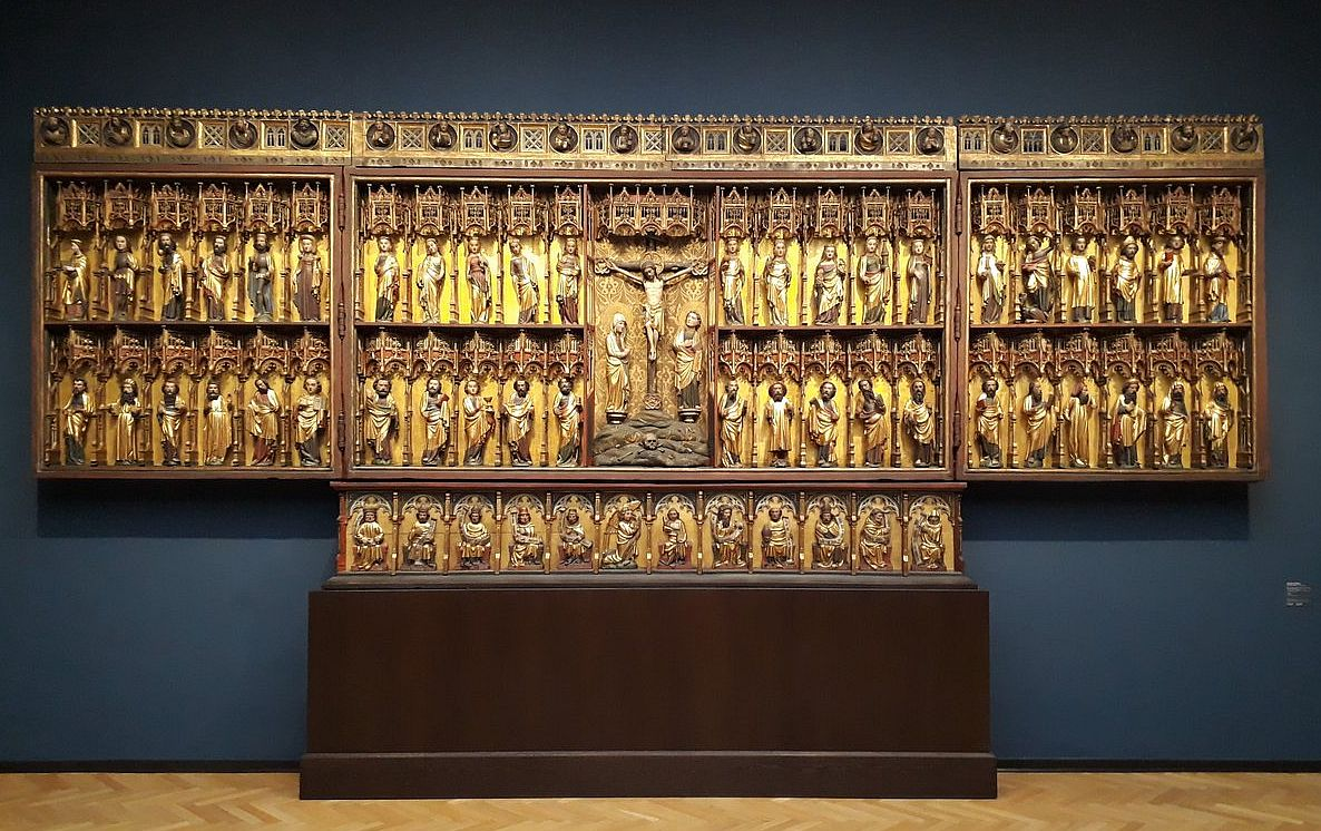 Hamburg - Grabower Altar